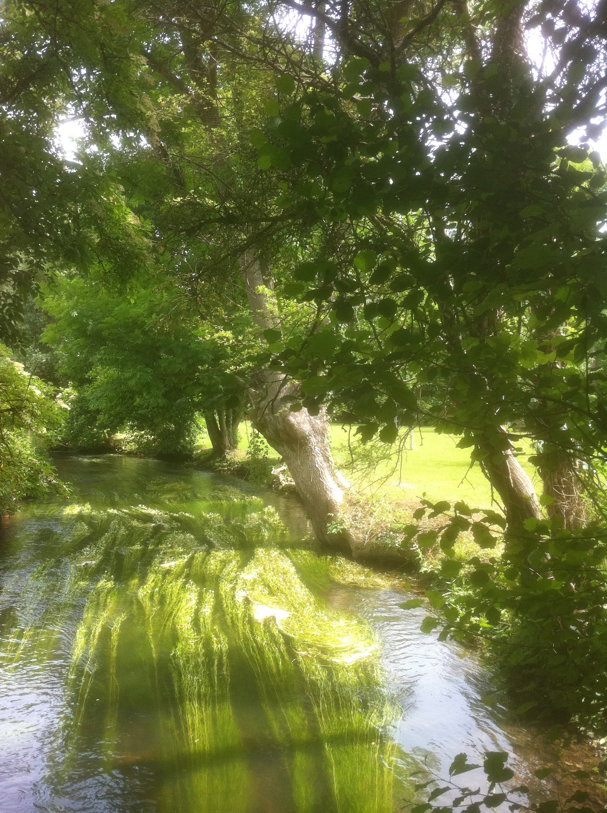 Le ruisseau l'Iton coulant à Brosville (Eure)